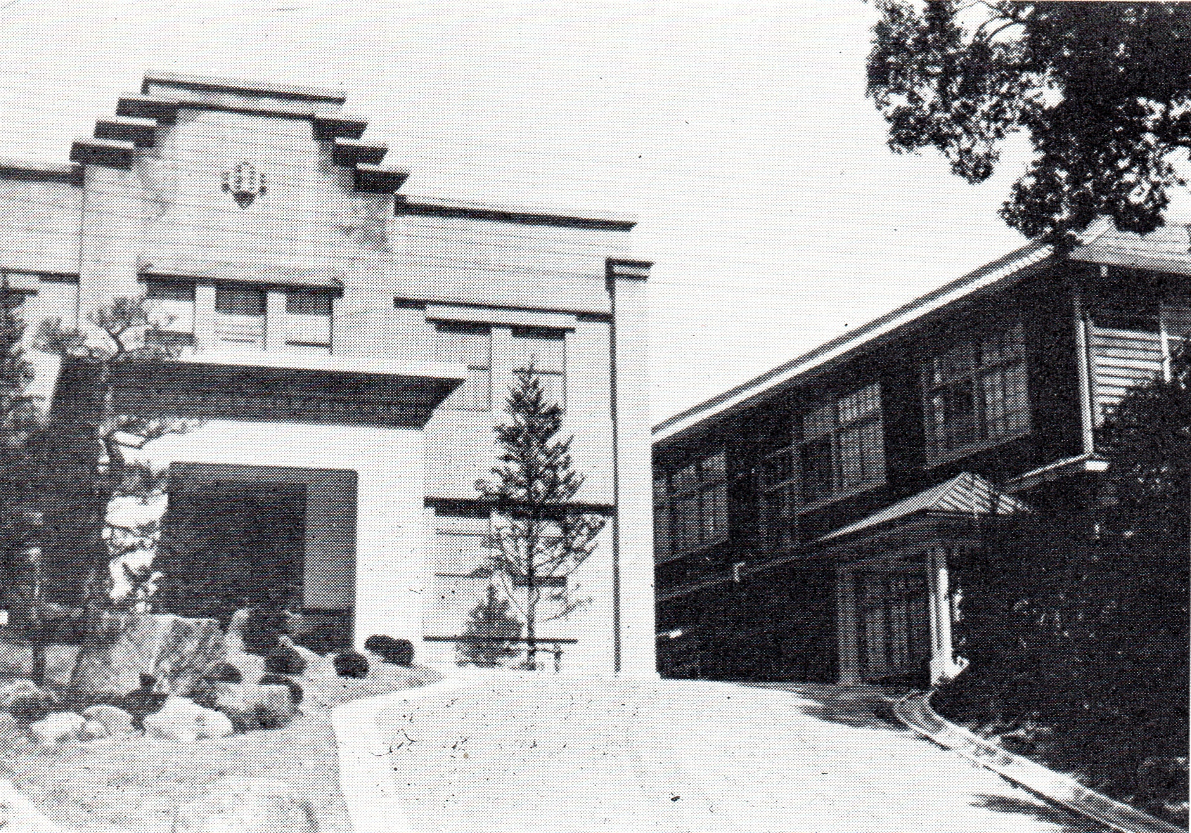 岡崎市立高等女学校の講堂（1929年5月26日完成）